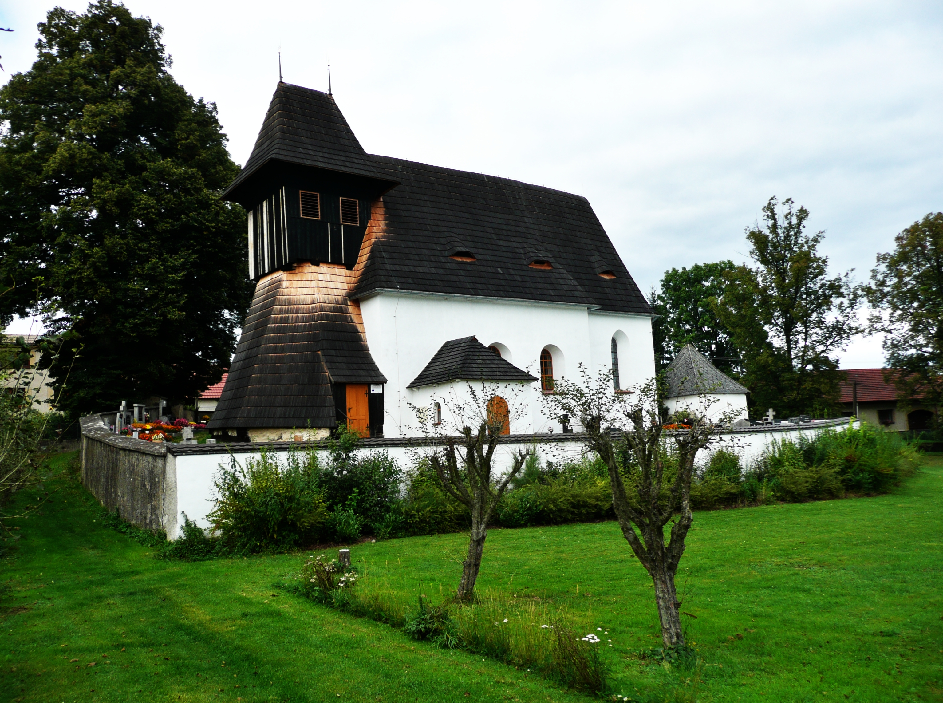 Kostel sv. Filipa a Jakuba (Mnichovice), náves, Mnichovice